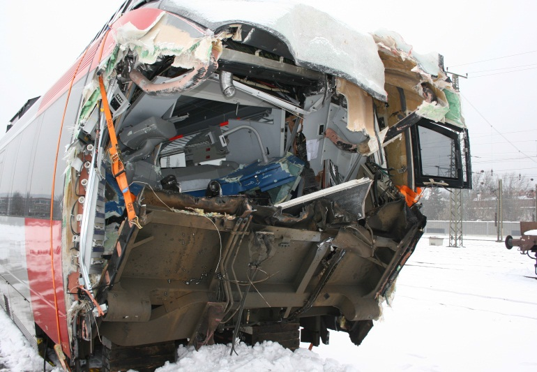 Am 21. Jänner 2013 kam es auf dem eingleisigen Abschnitt der Wiener S-Bahn zwischen Hütteldorf und Penzing zu einem Frontalzusammenstoß zweier vollbesetzter 4024-Garnituren der Vorortelinie S45. 8 Passagiere und einer der beiden Triebfahrzeugführer wurden schwer, 40 Reisende und der andere Triebfahrzeugführer leicht verletzt. Der Führerstand des 4024 129 wurde bei der Kollision am 21. Jänner 2013 vollständig zerstört.